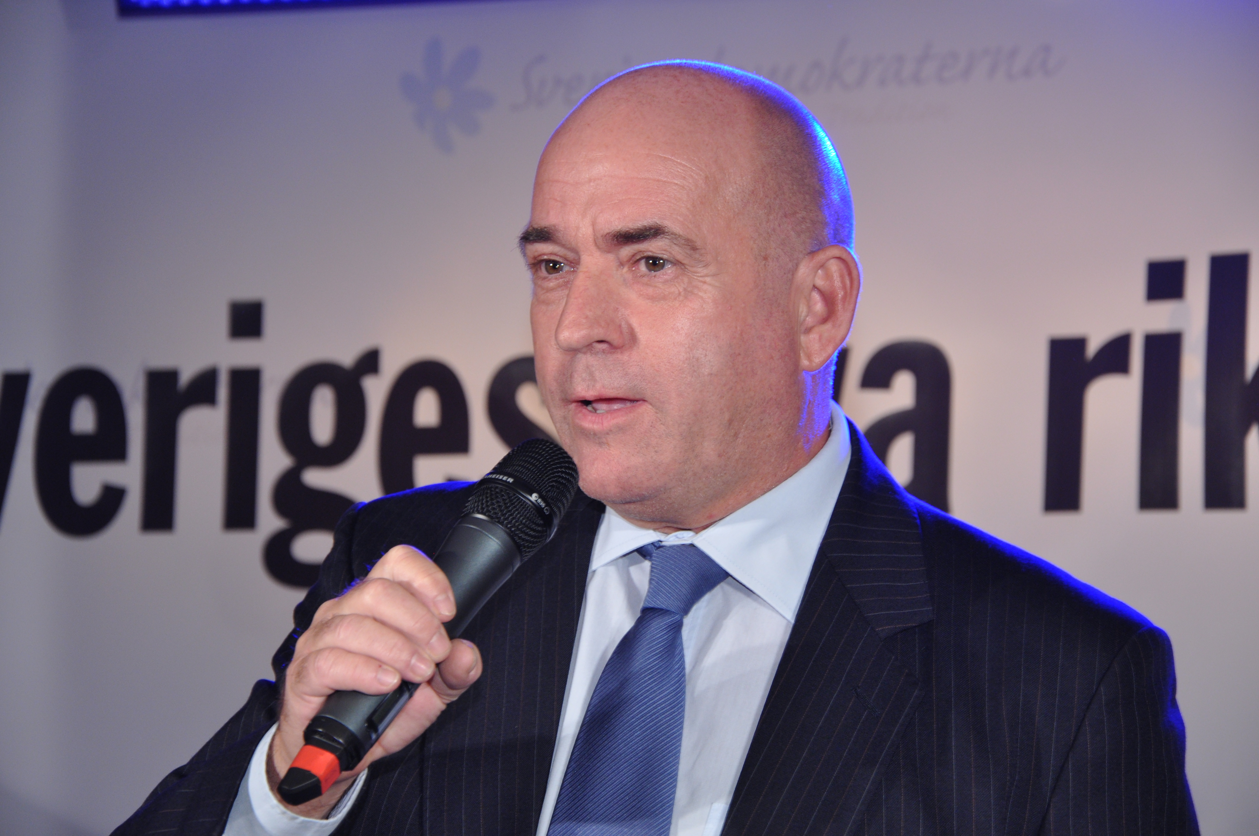 Sören Espersen, på Sverigedemokraternas valvaka 2010